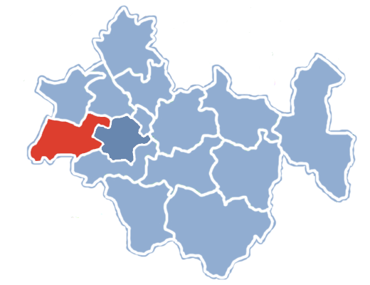 Położenie gminy Ładzice na terenie powiatu radomszczańskiego.